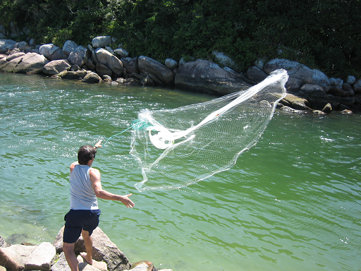 Pescador jogando rede na Barra da Lagoa, em Florianópolis. Fisher at Barra da Lagoa, Florianópolis, Brazil.